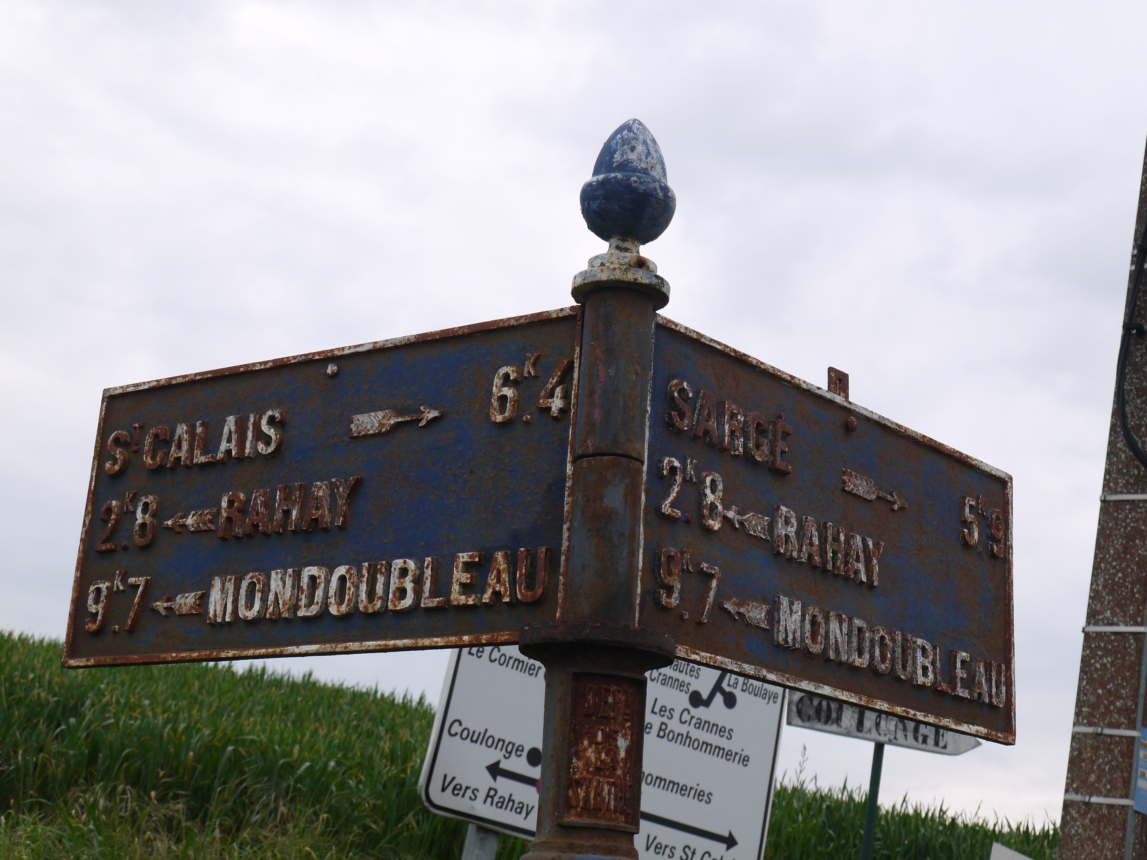 Plaques de cochers sur poteau située en bordure de la RD 135.